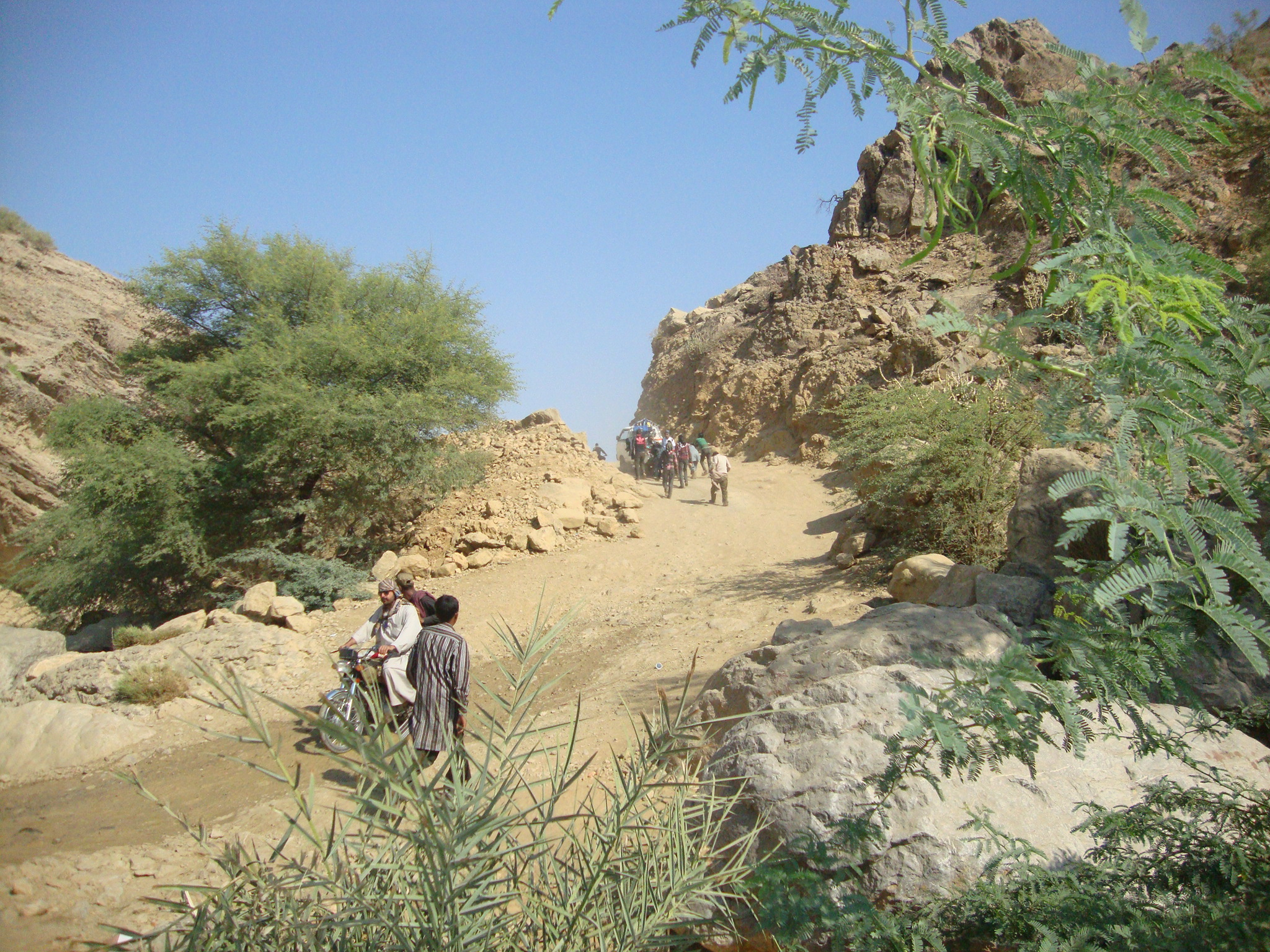 karachi walo Norani Zaroo jao Maza Ae ga